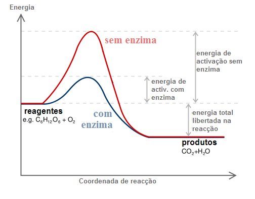 Activacao_energia_cinetica_enzimatica (activation energy enzyme kinetics)